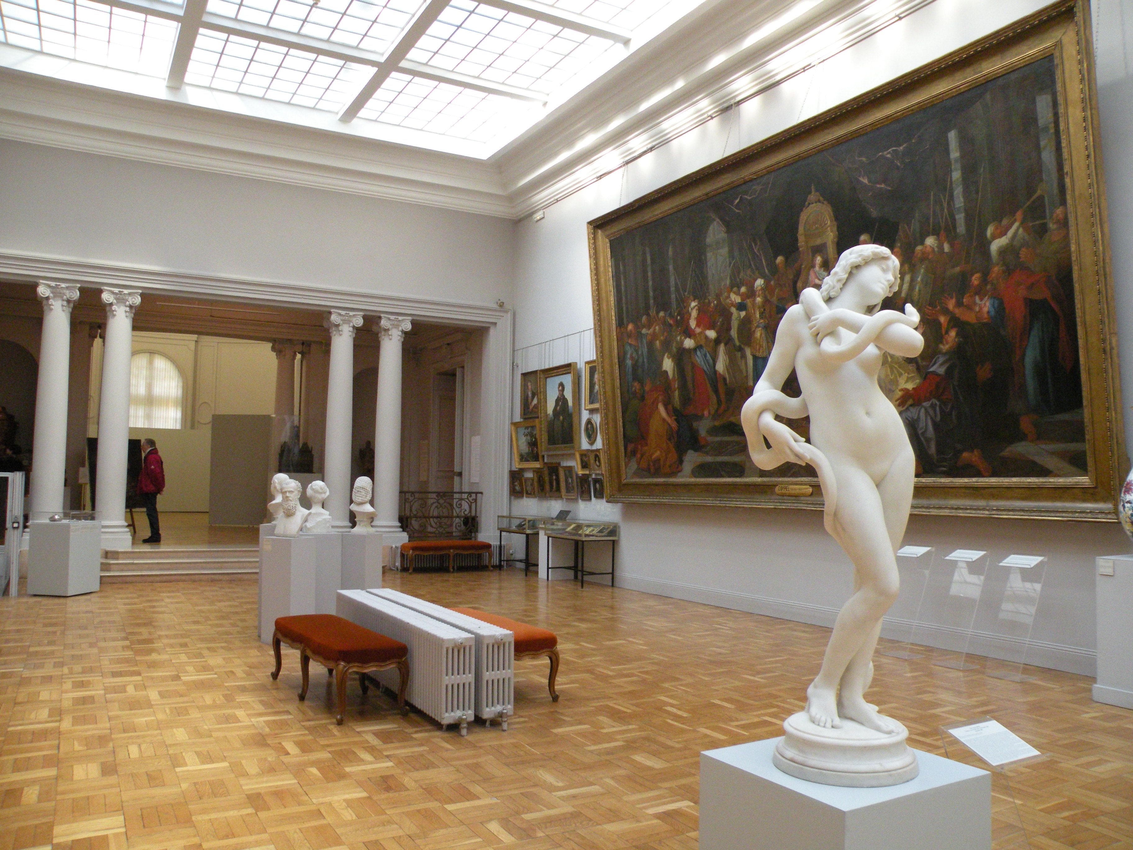 Musée Antoine-Lécuyer